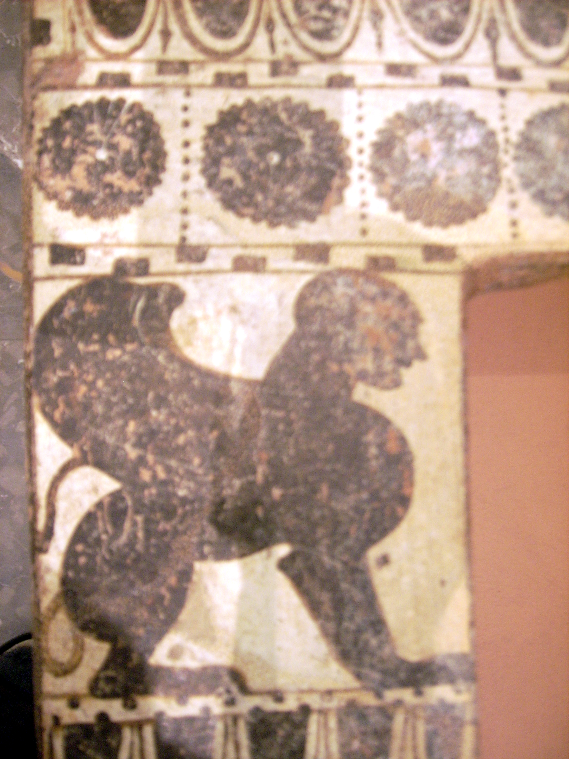 Klazomenischer Sarkophag aus Klazomenai mit homoerotischer Szene adeliger Jünglinge im Kopfteil, Detail: Sphinx; Länge 195 cm, Breite 74/62 cm, Tiefe 33,5 cm; bemalt im schwarzfigurigen Stil; Inv.-Nr.: 30030, Antikensammlung Berlin/Altes Museum